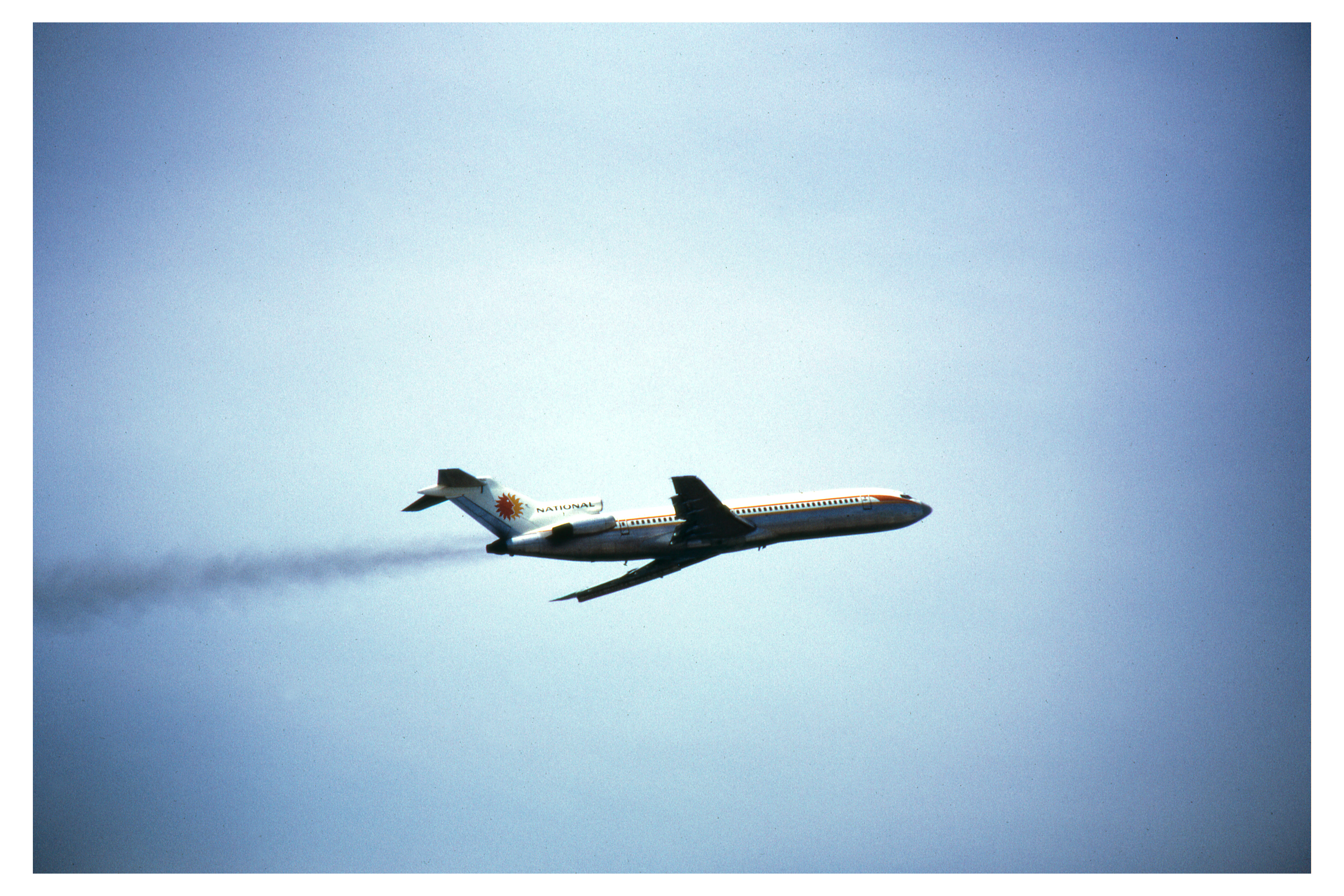 JFK 1971.